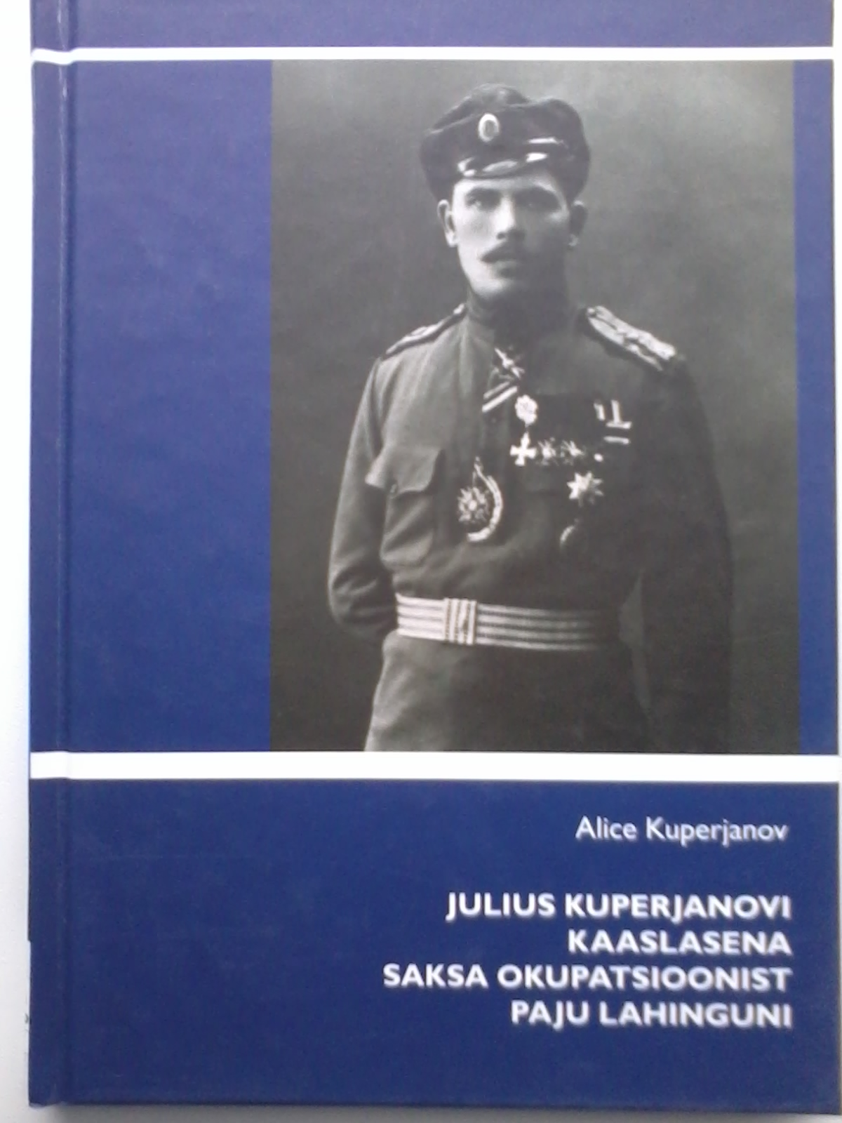 Alice Kuperjanov, "Julius Kuperjanovi kaaslasena Saksa okuptasioonist Paju lahinguni" (2008)